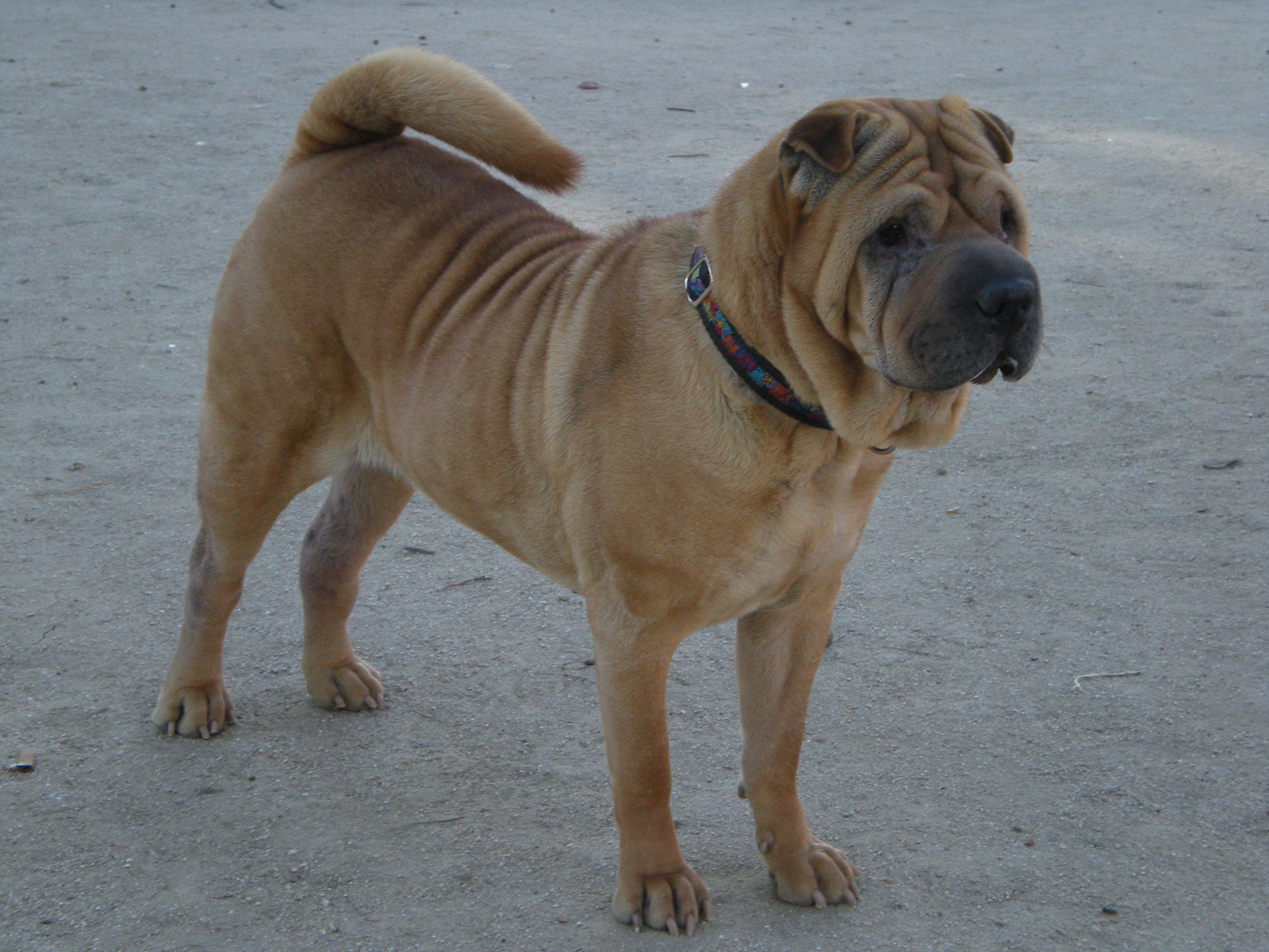 Gorda